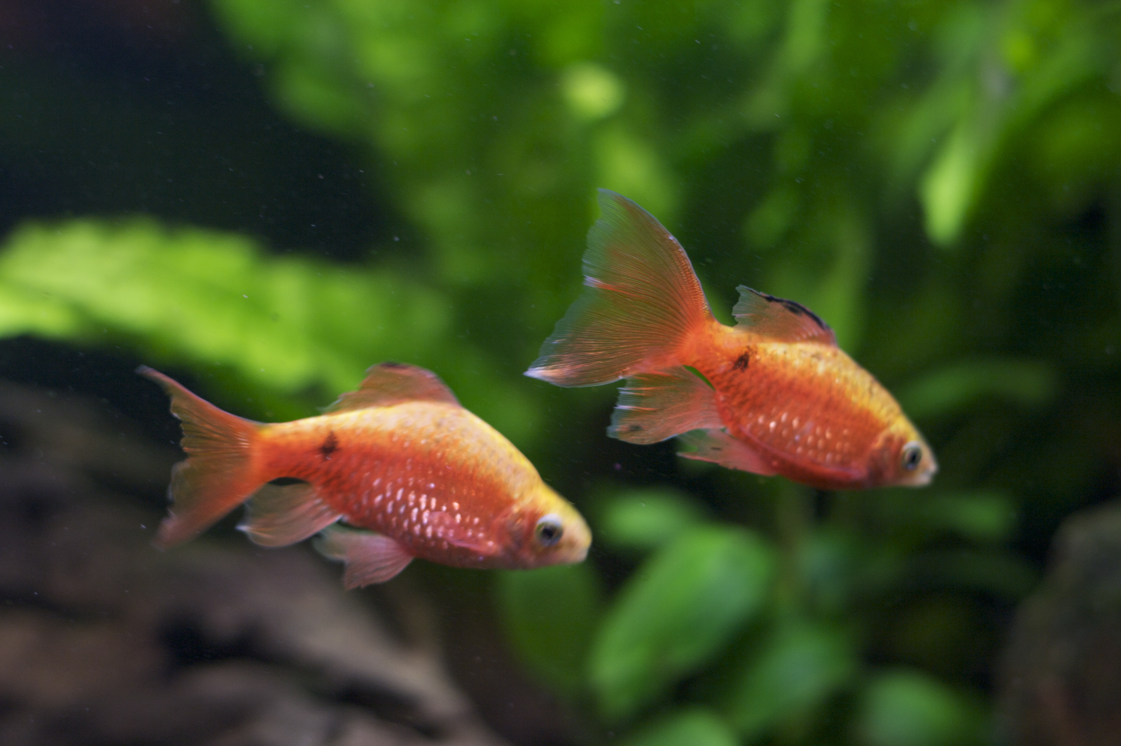 Rosy Barbs